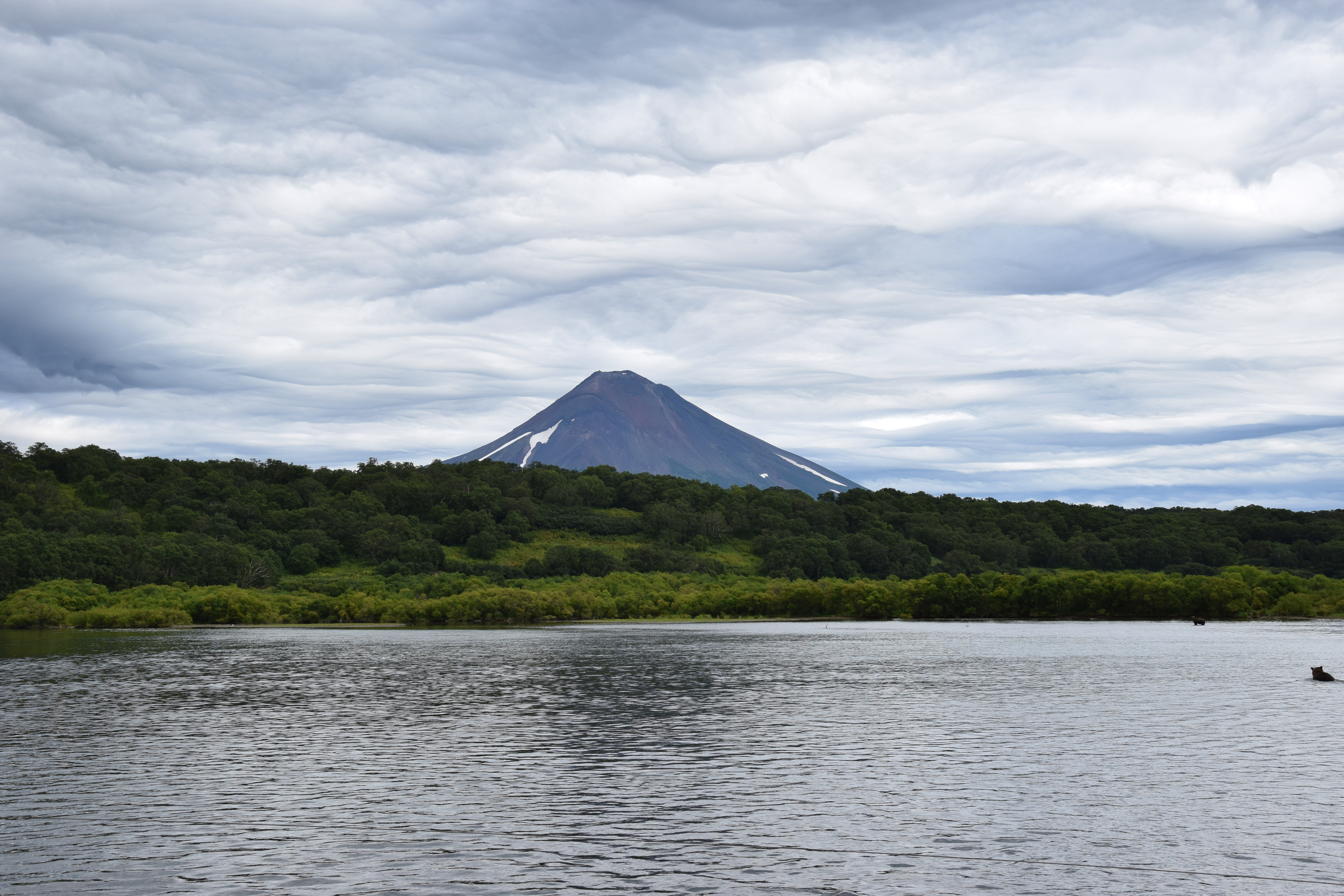 Курильское озеро и Ильинский вулкан, Усть-Большерецкий район, Камчатка This image is related to the protected area of Russia number 4110184